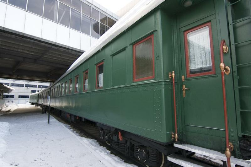 Вагон-салон № 75112 в експозиції Київської виставки рухомого складу історичних локомотивів та вагонів